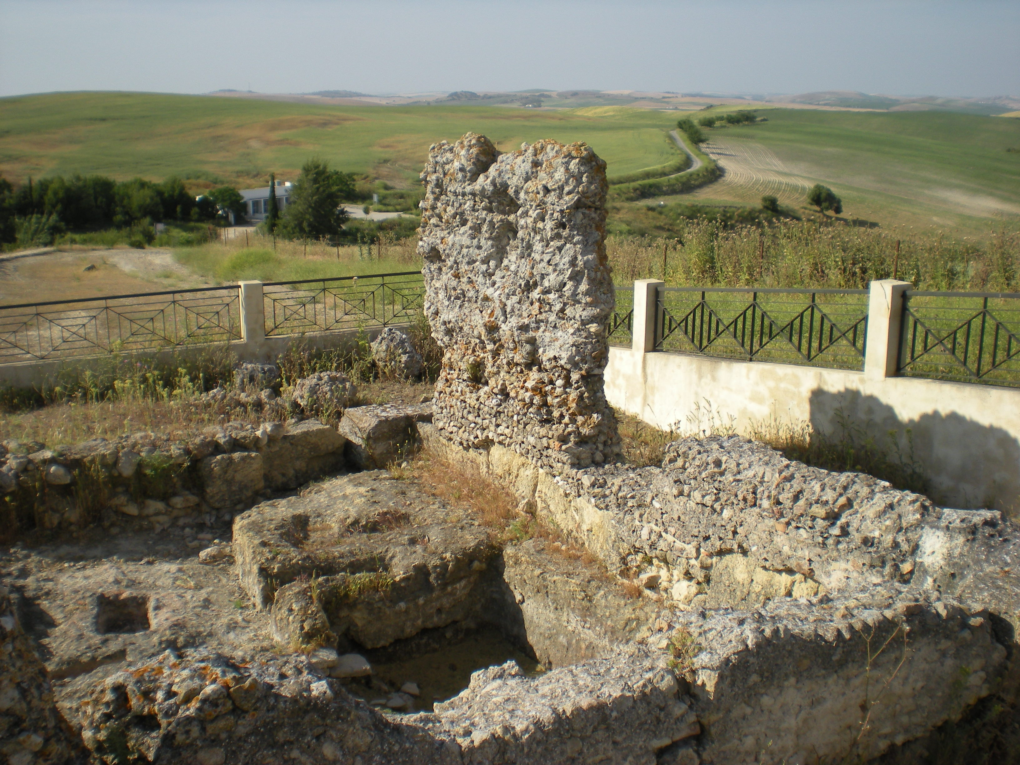 Restos de un mausoleo romano en Carissa Aurelia, Espera (Cádiz).